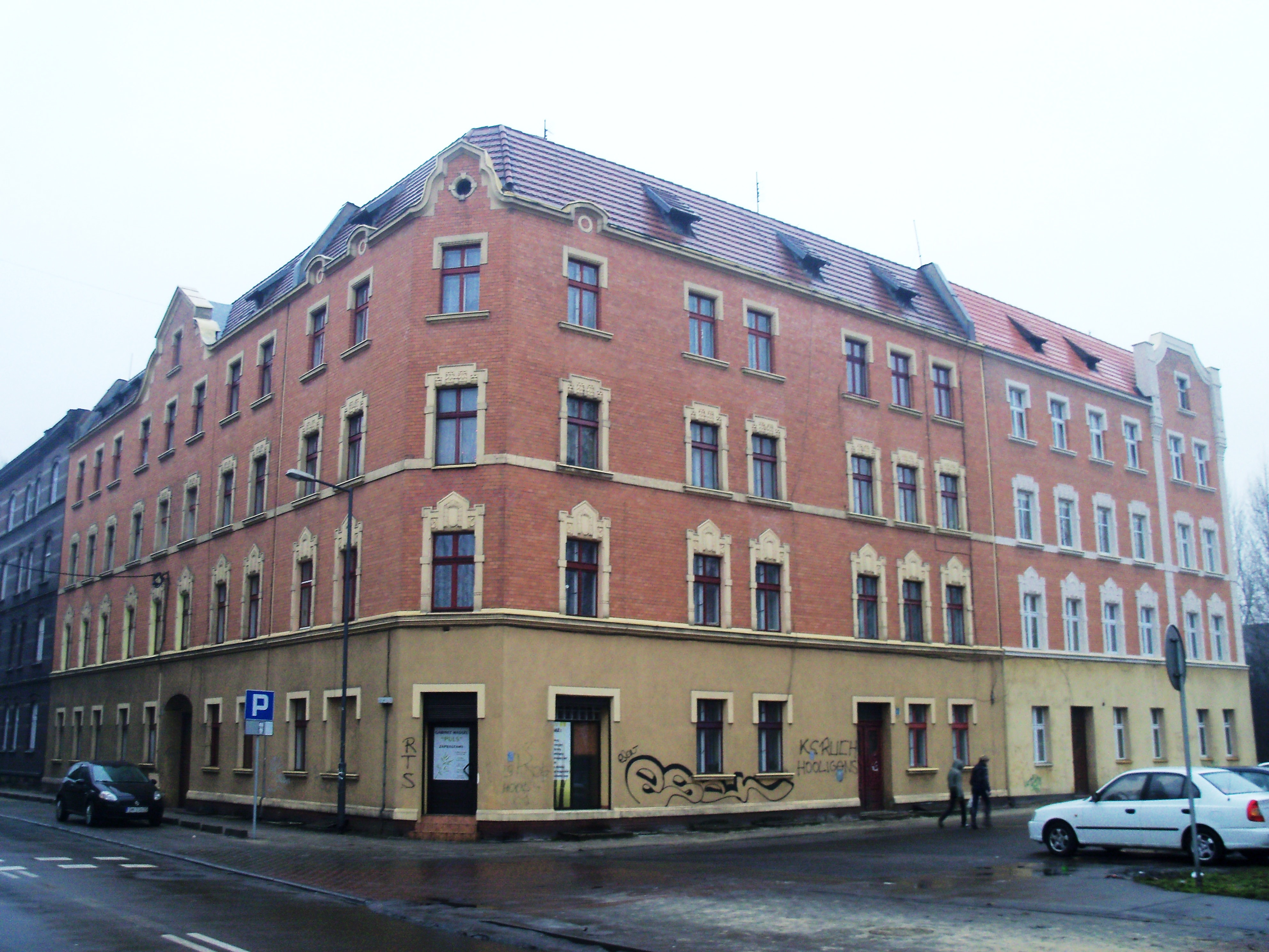 Ulica 11 Listopada w Katowicach-Szopienicach